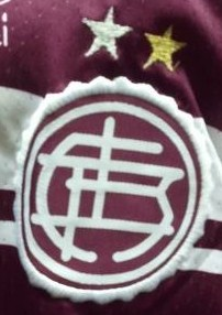 Lanus2estrellas